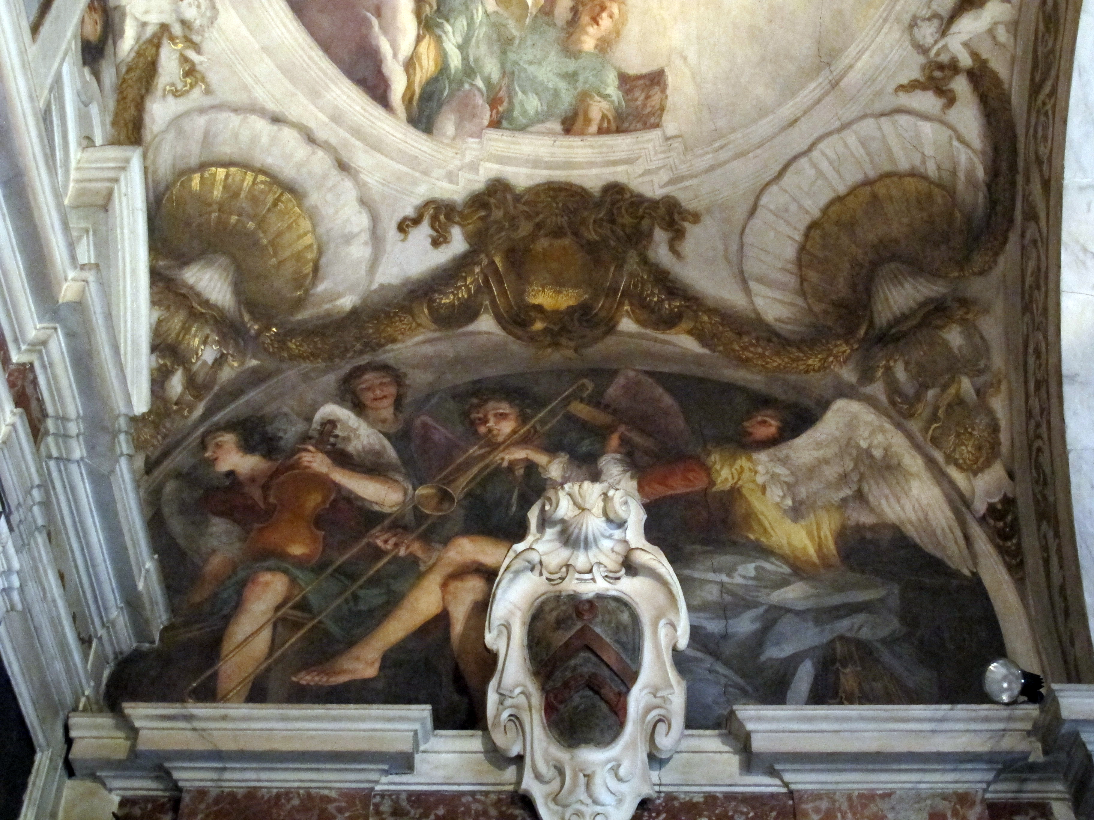 Firenze, miscellanea